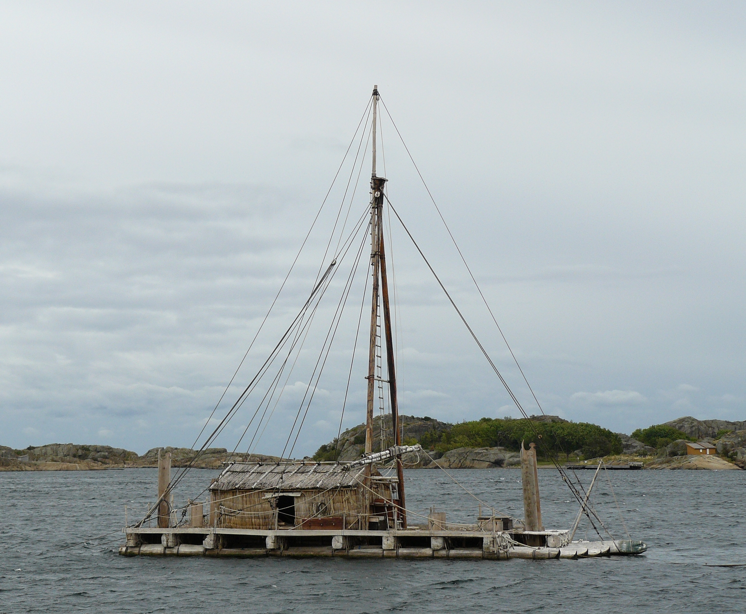 Tangaroa balsaboat, Bærum